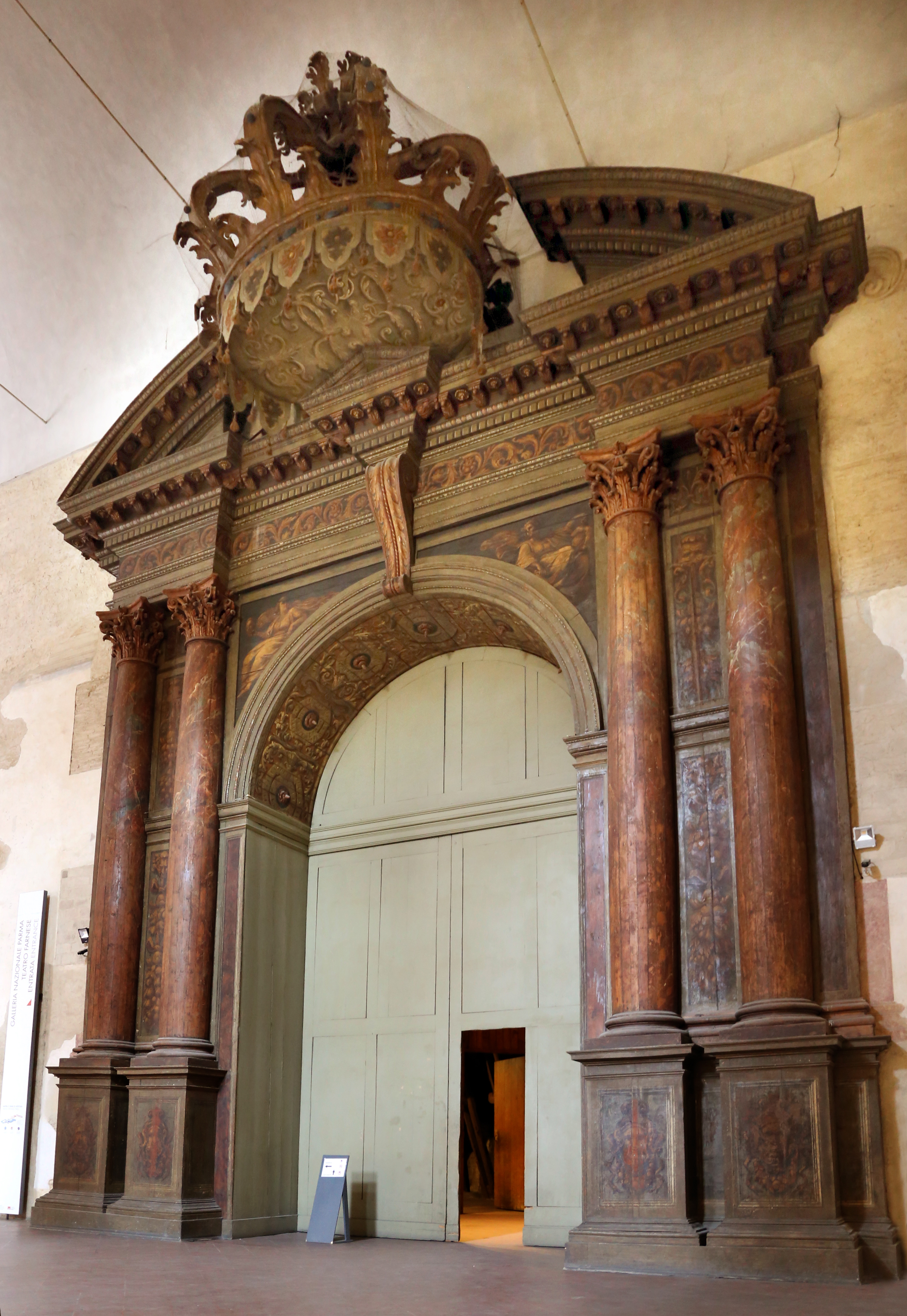 Teatro Farnese This is a photo of a monument which is part of cultural heritage of Italy.